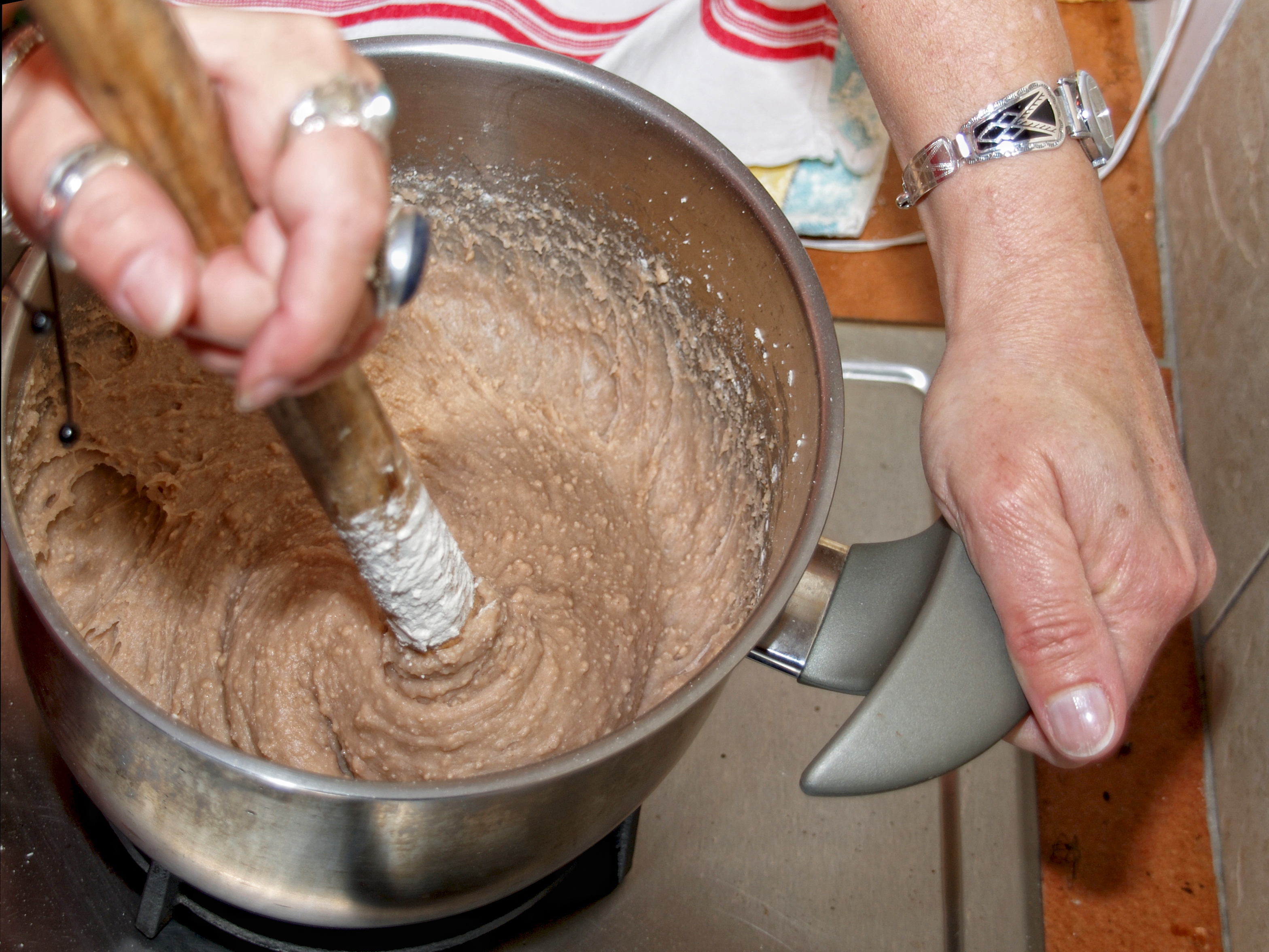 Pulenda - Remuer sans cesse pendant la cuisson de la farine de châtaigne